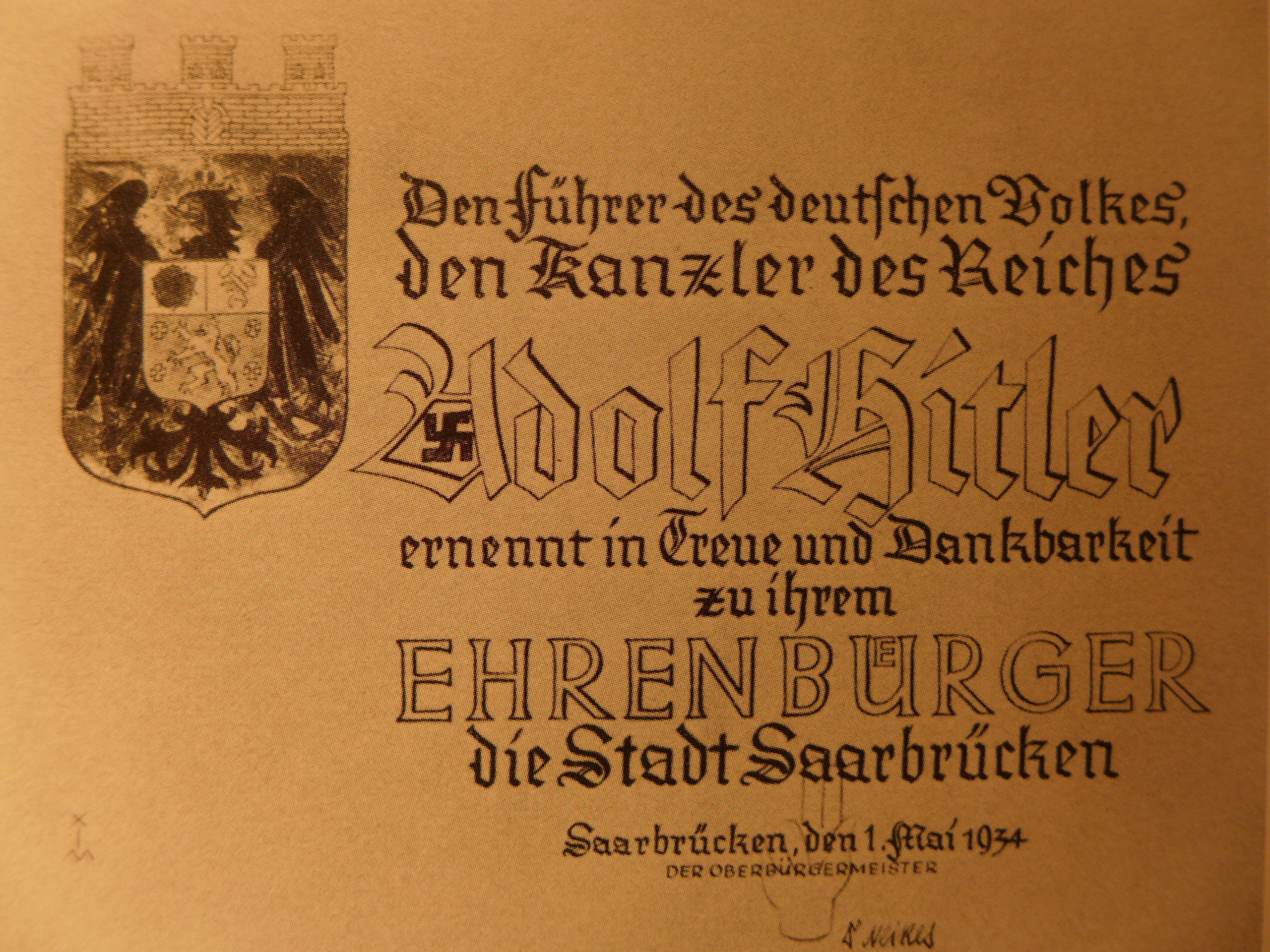 Verleihung der Ehrenbürgerschaft an Adolf Hitler am 1. Mai 1934